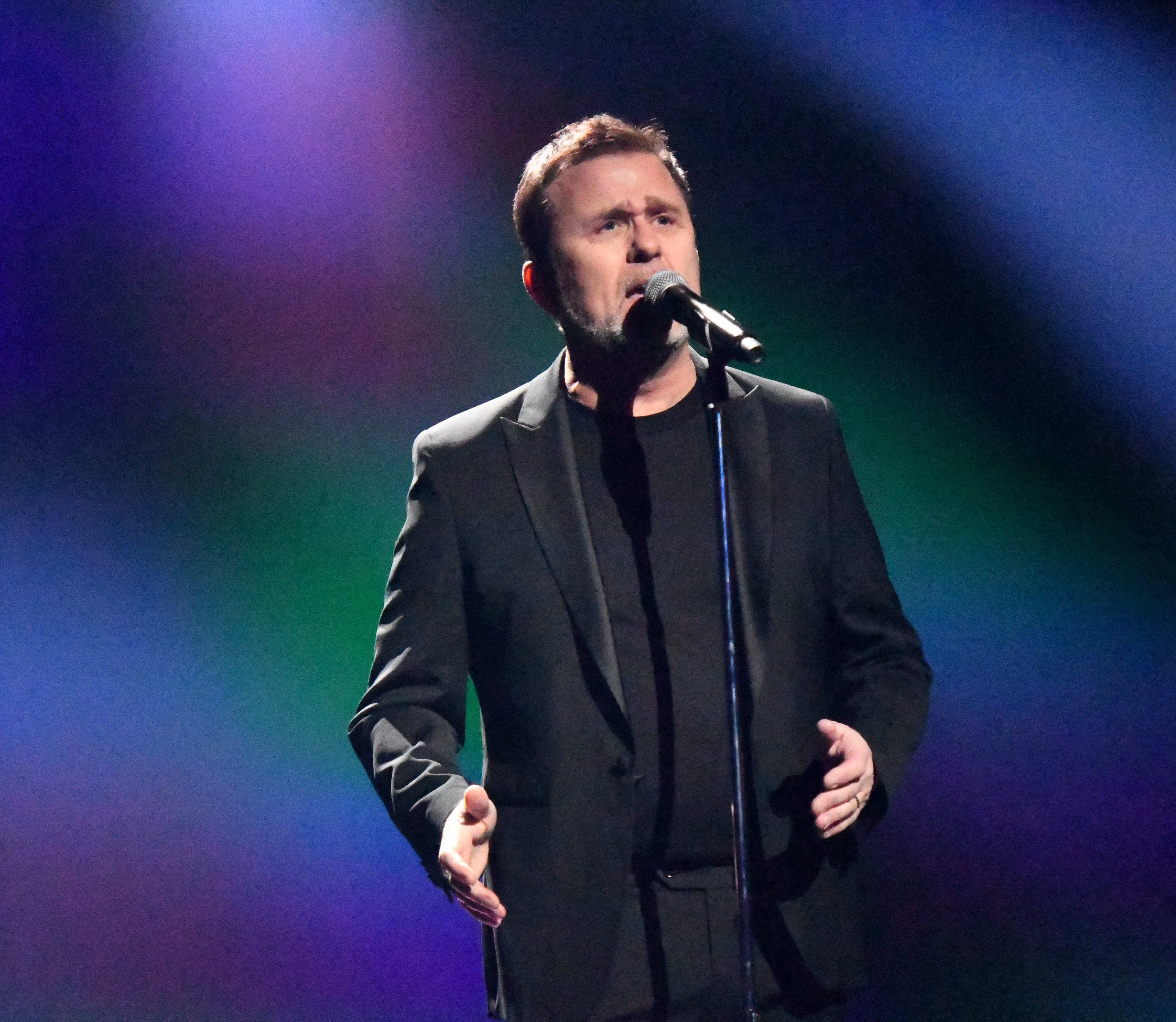 Melodifestivalen 2020, deltävling 2, Göteborg, Jan Johansen